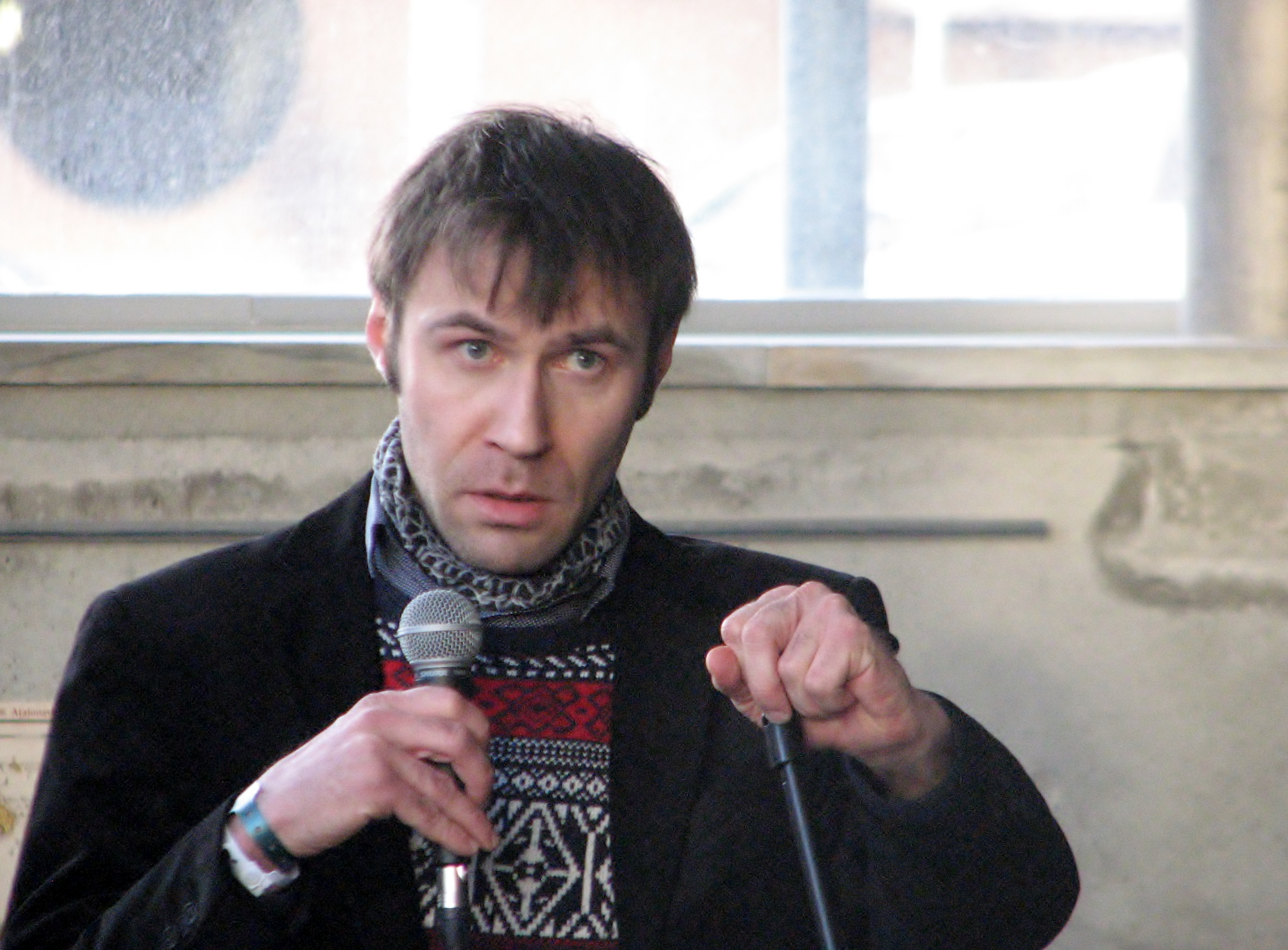 Roomet Jakapi esinemas Tallinn Music Weekil ansambel Kreatiivmootor koosseisus